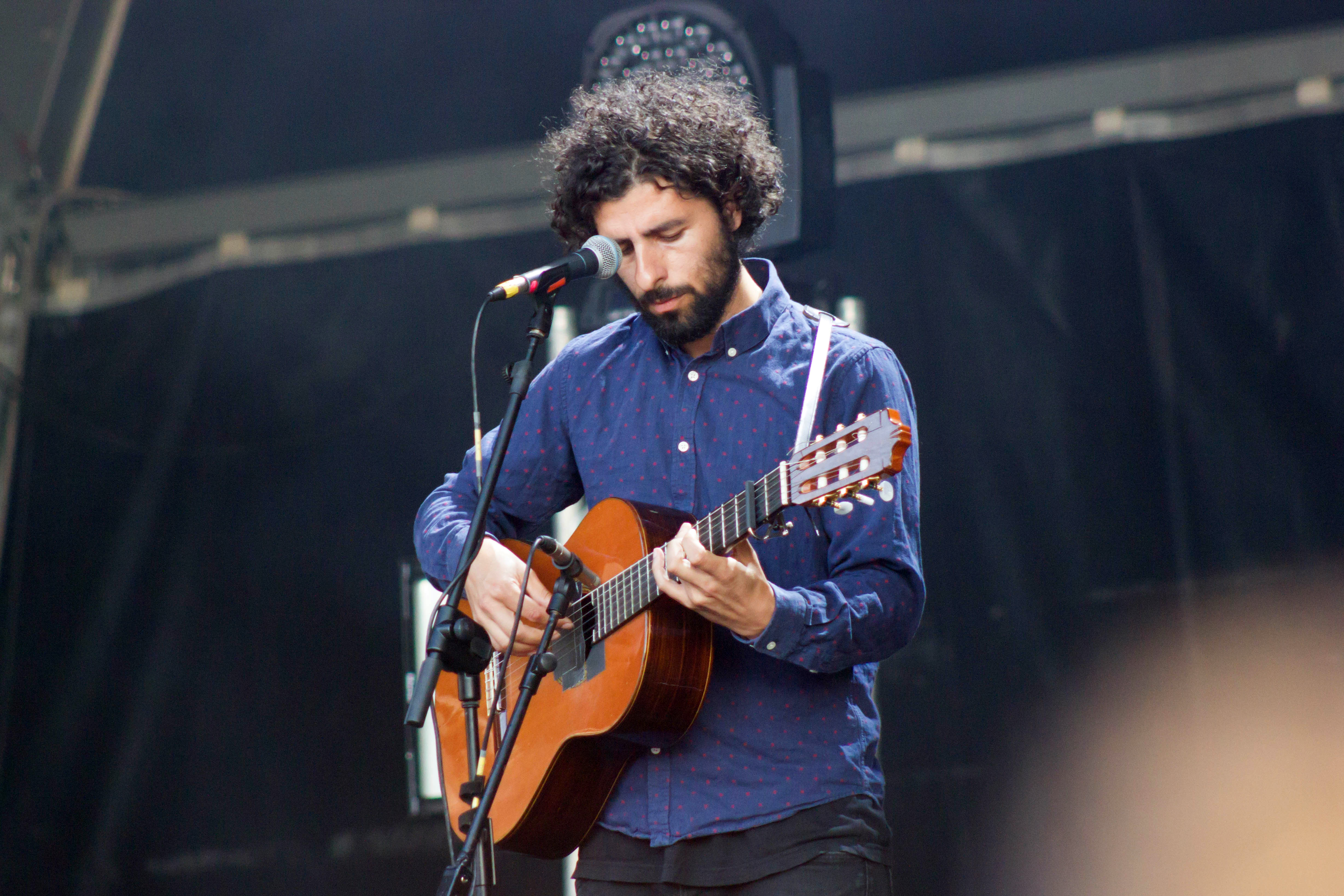 O músico sueco José González no NOS Primavera Sound 2015 de Porto.